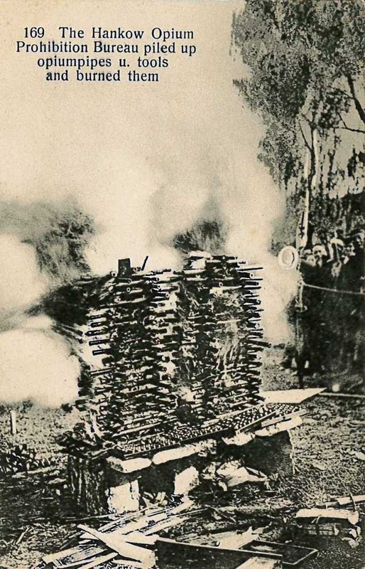 中国での阿片禁止令により、焼却される阿片喫煙パイプ